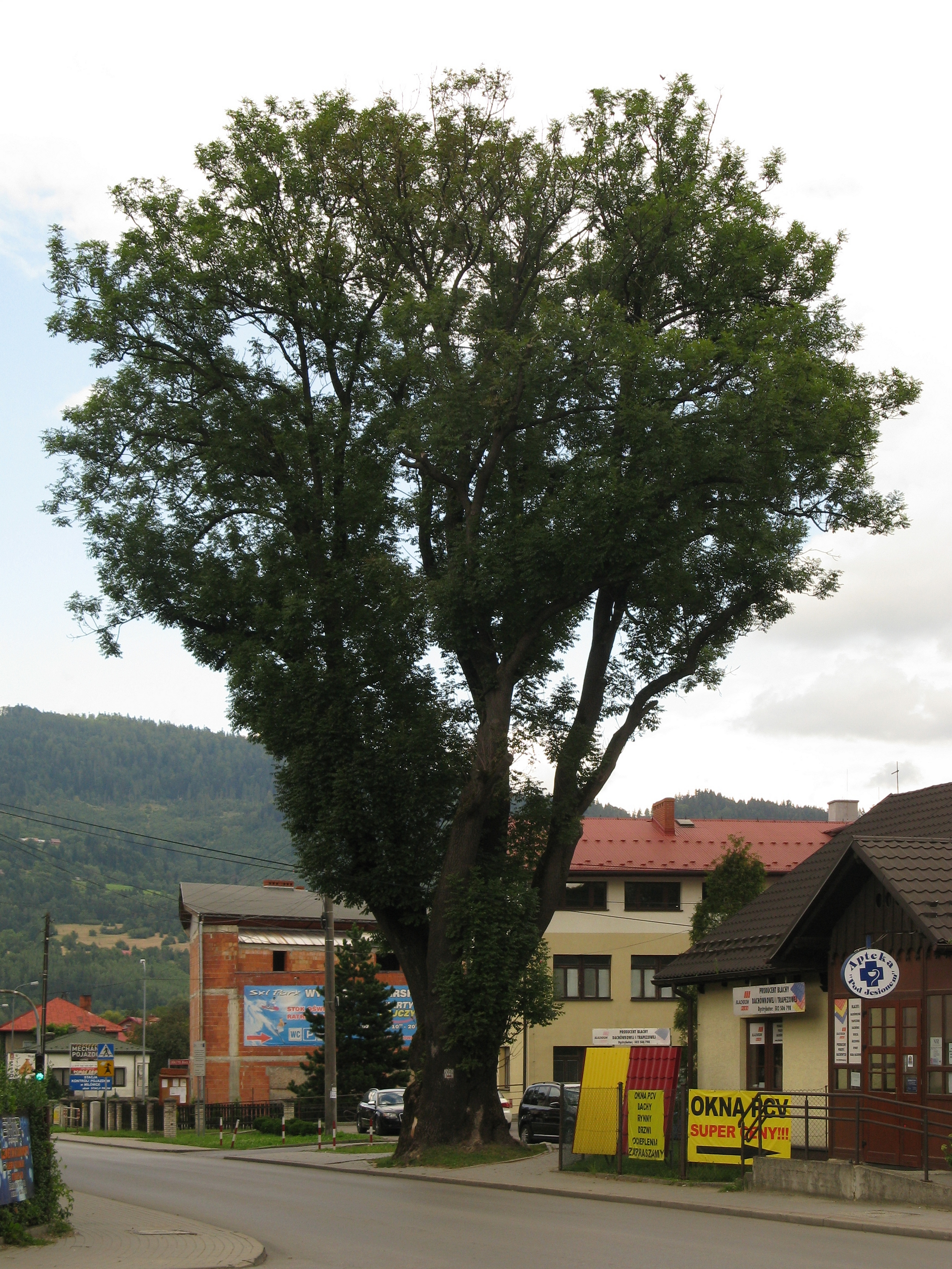 Rajcza, jesion wyniosły (Fraxinus excelsior) – pomnik przyrody (obwód pnia około 574 cm).